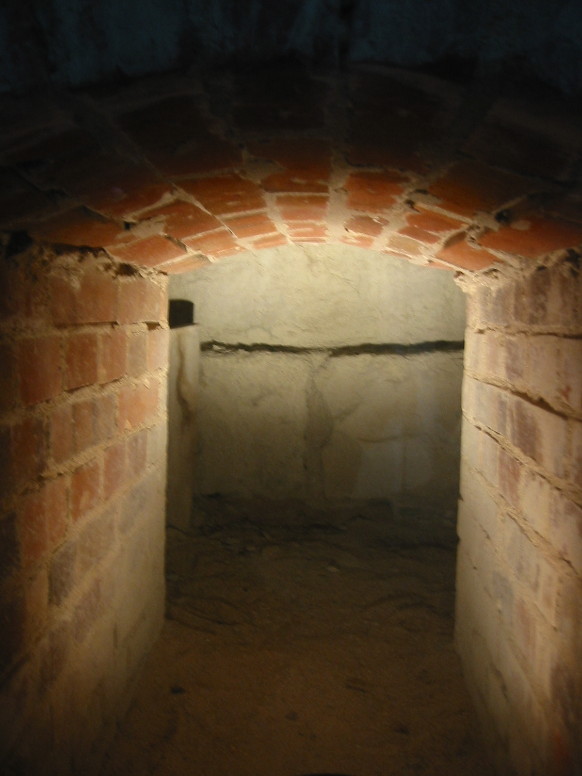 日御碕灯台 内側のレンガから外側の切石積み部分を望む